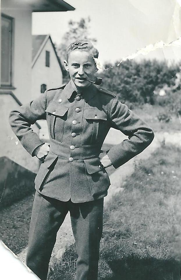 Hans Schultz (1920-2010), Danish resistance member and industrialist